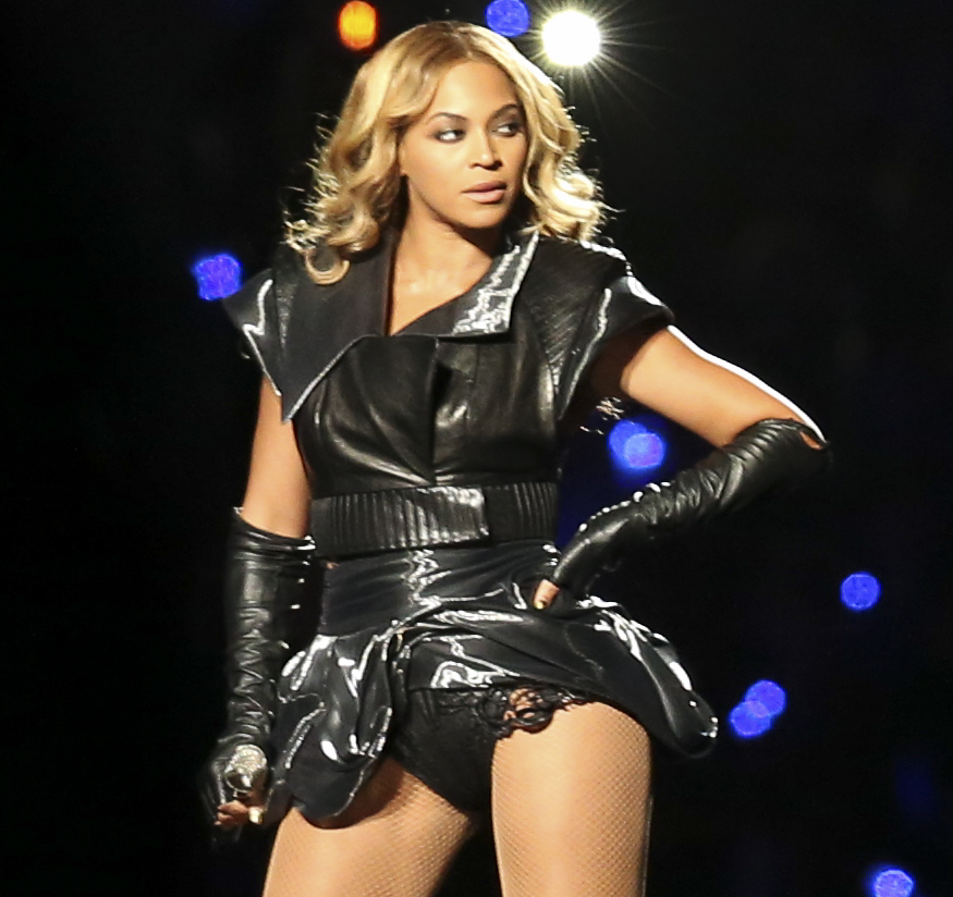 DW2Q0596